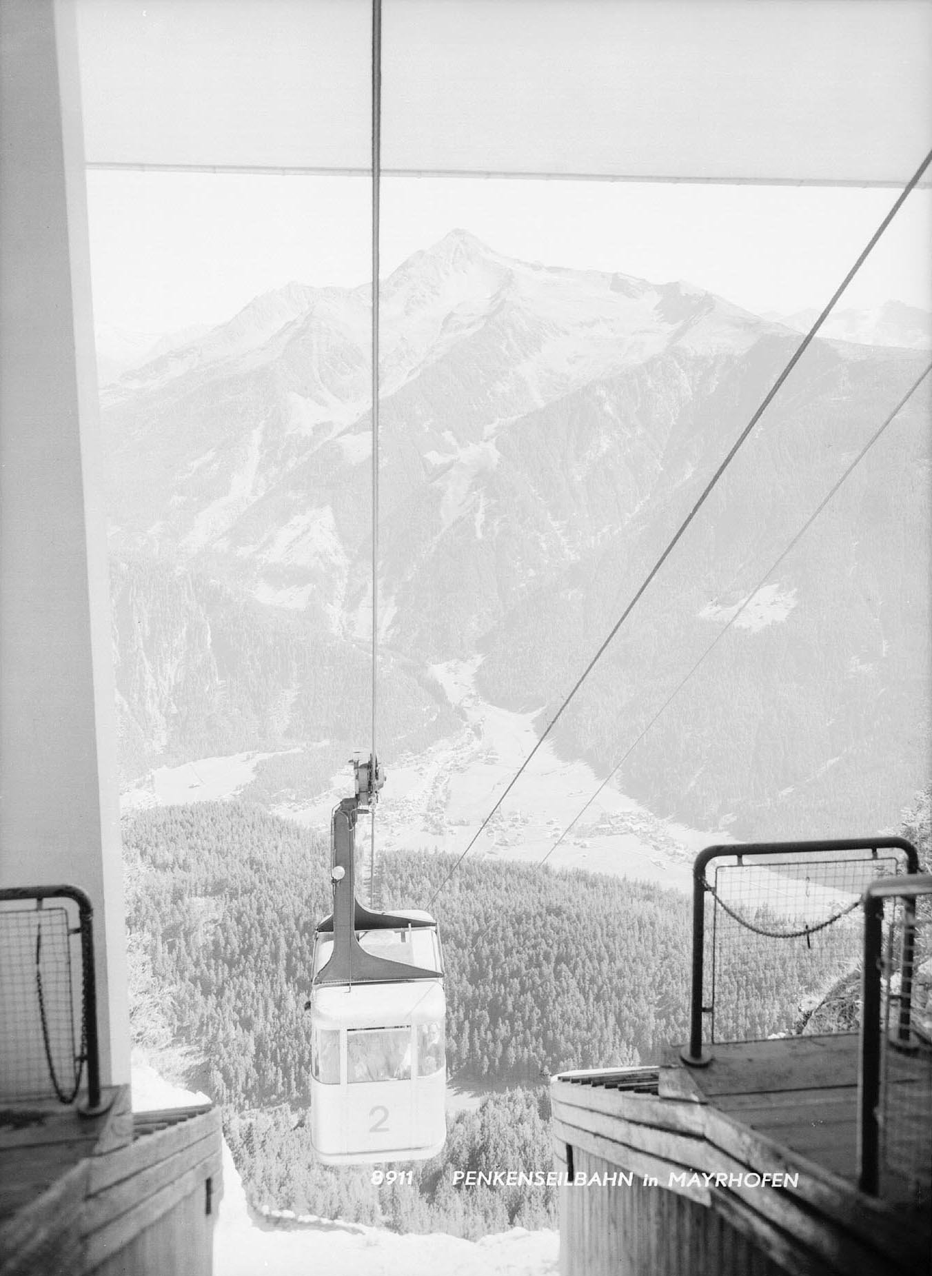 Penkenseilbahn in Mayrhofen